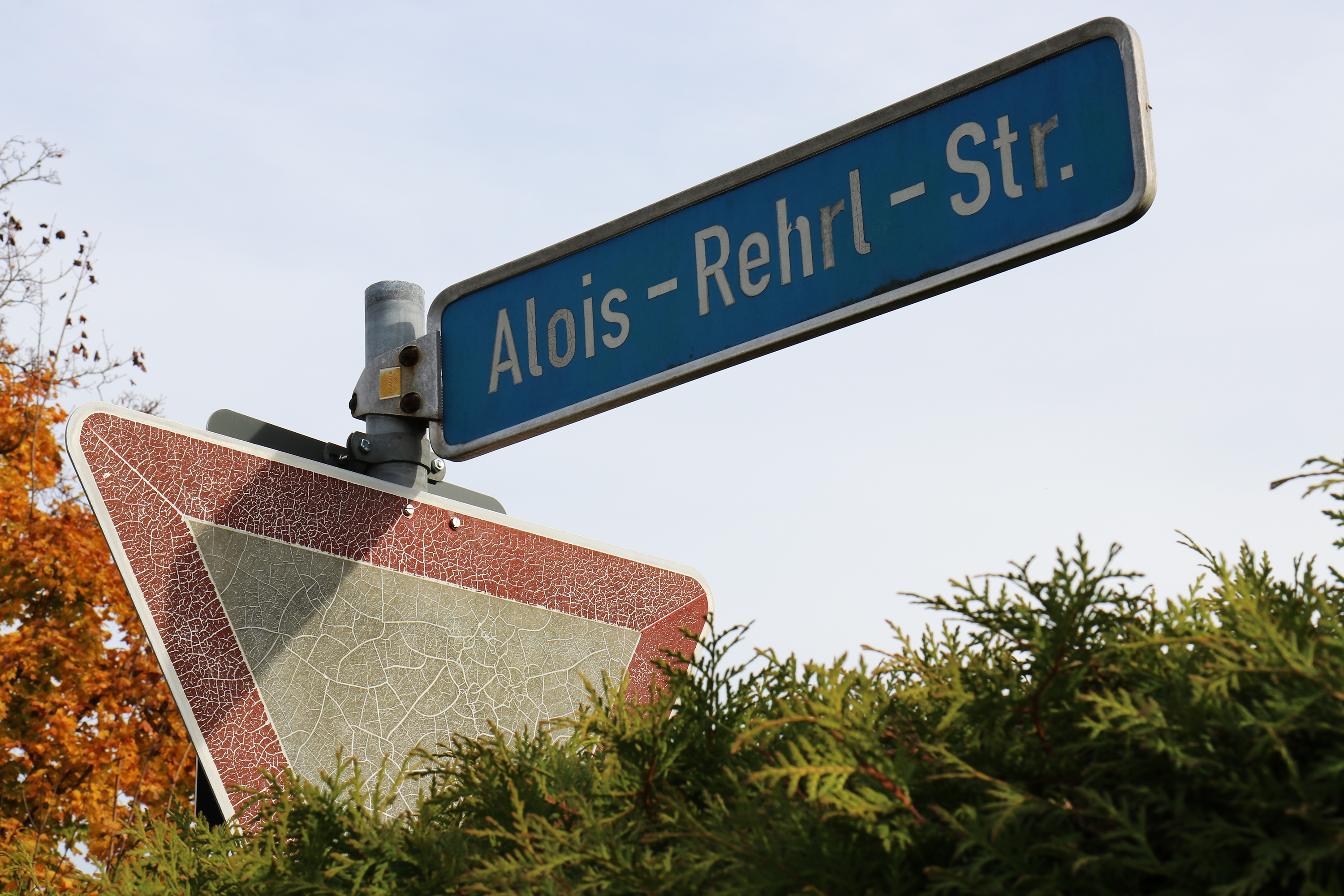 Straße in Fridolfing (Landkreis Traunstein), benannt nach dem Landwirt und "Strom-Pionier" Alois Rehrl (1827-1900), auf dessen Bemühungen die erstmalige Versorgung Fridolfings mit elektrischen Strom zurückgeht.